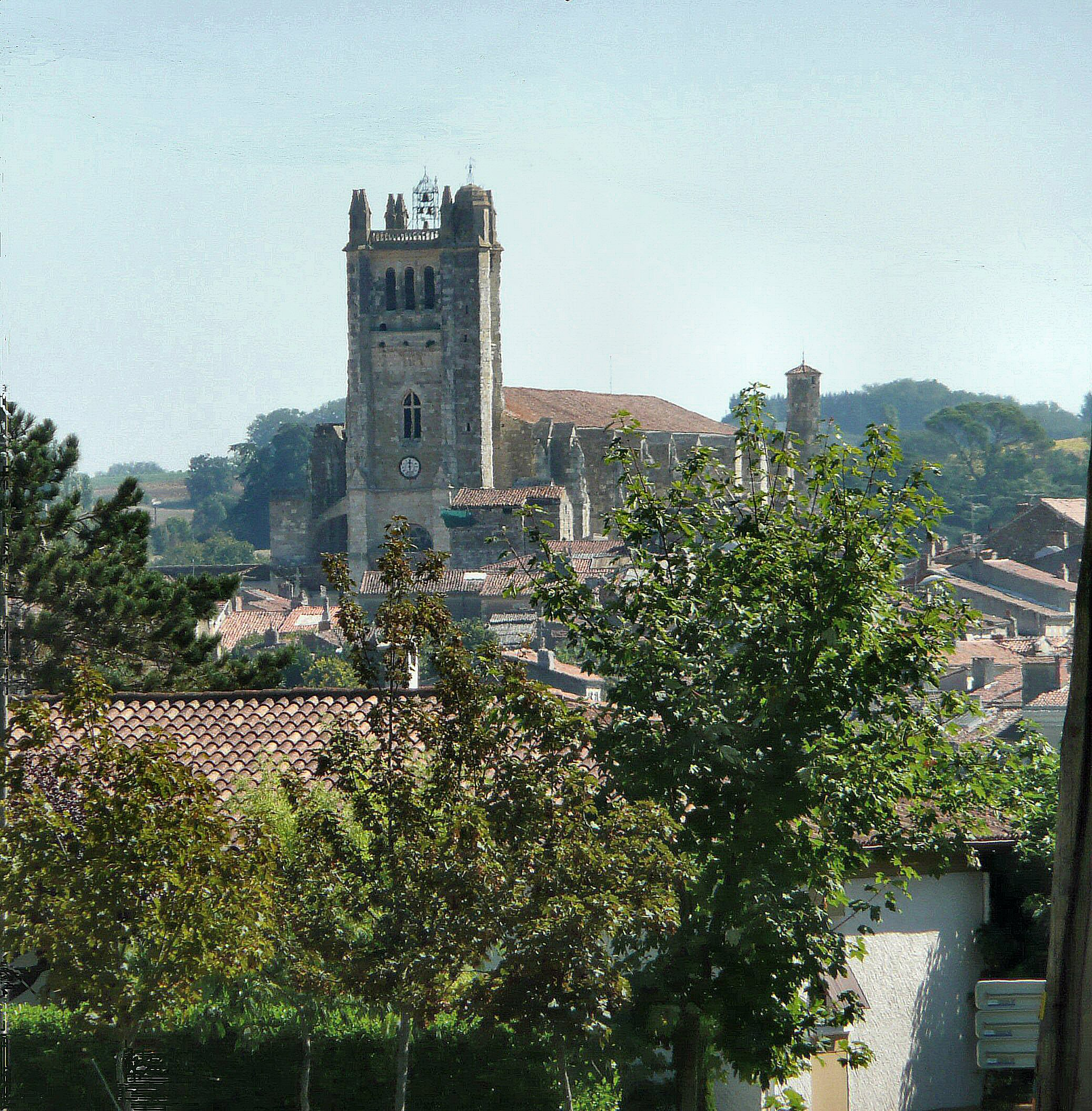 Vue de Condom depuis la route de Fourcès